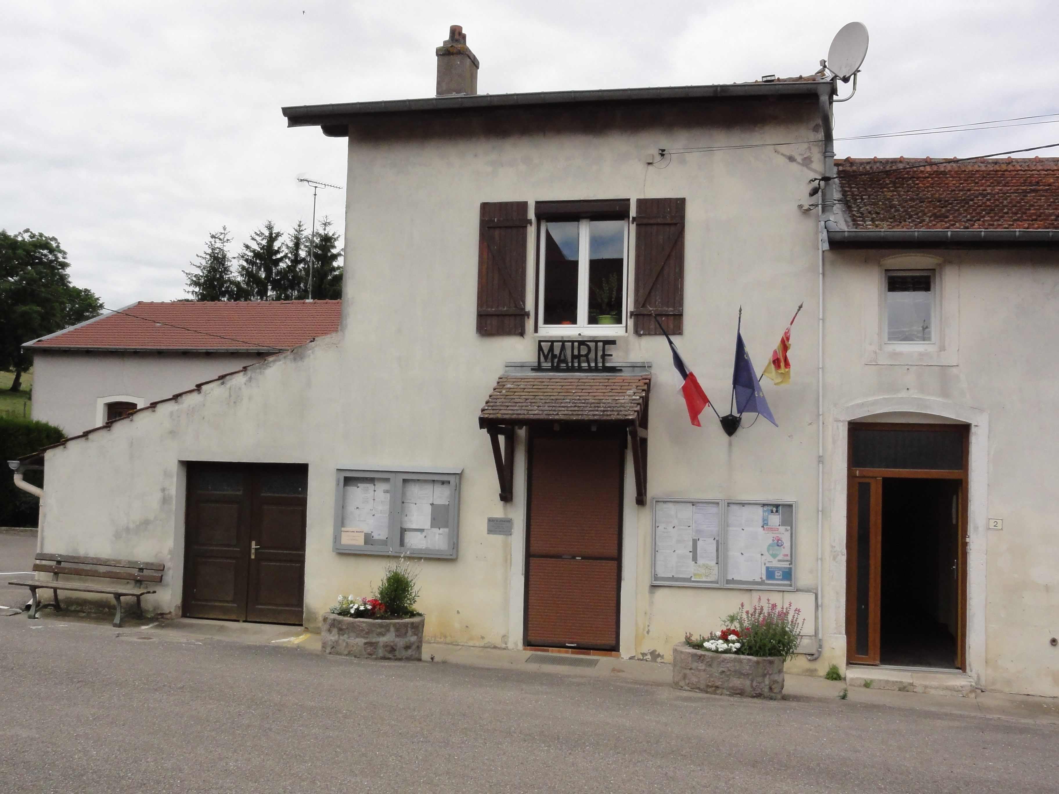 Affracourt (M-et-M) mairie